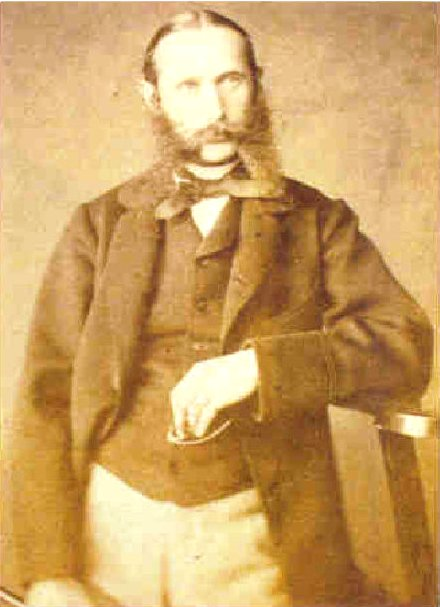 Maximilian August Scipio von Brandt (* 8. Oktober 1835 in Berlin; † 24. August 1920 in Weimar) war ein deutscher Diplomat, Ostasien-Experte und Publizist.